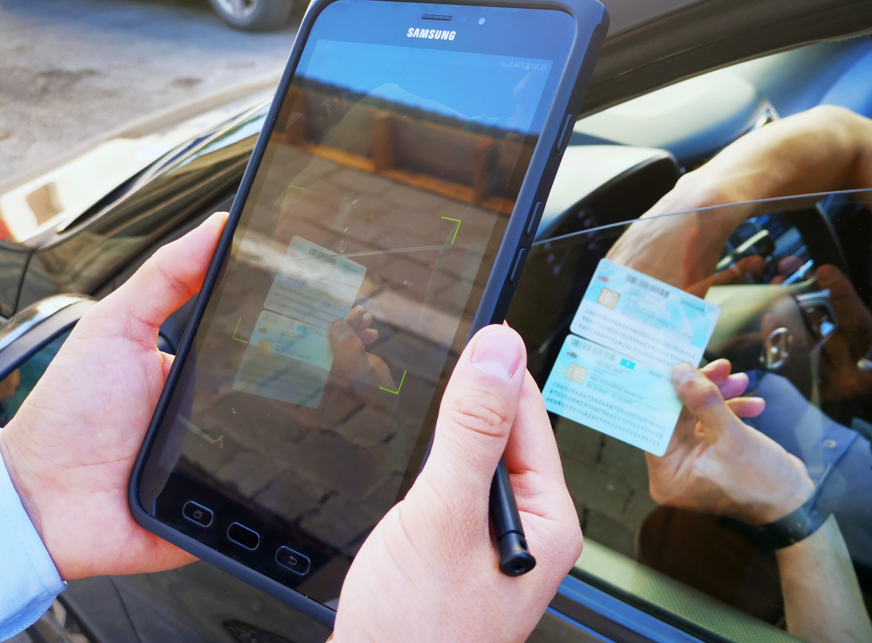 Проверка разрешения на проезд через приложение "Сергек. патруль"